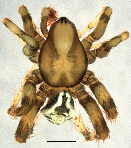 Australutica normanlarseni